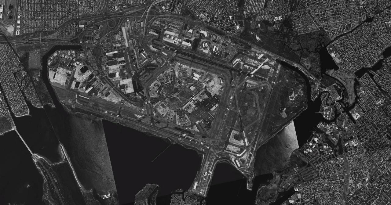 Satellitenbild vom John F. Kennedy International Airport. Landsat-7-Aufnahme der NASA aus World Wind